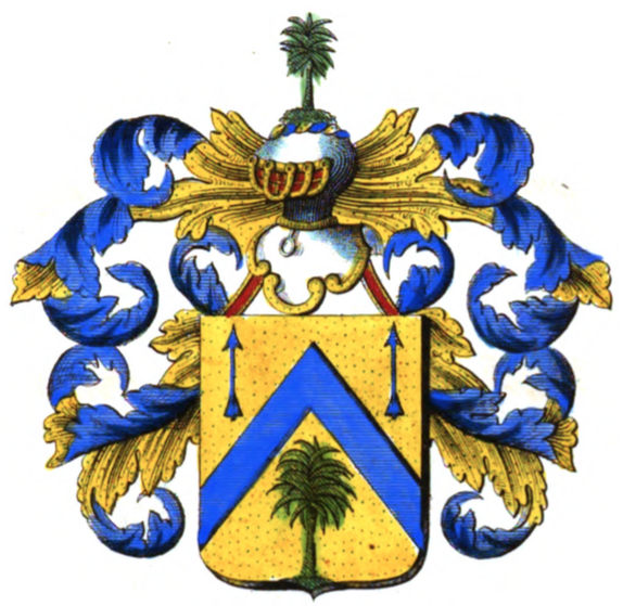 Armoiries de la famille Crombez de Rémond de Montmort